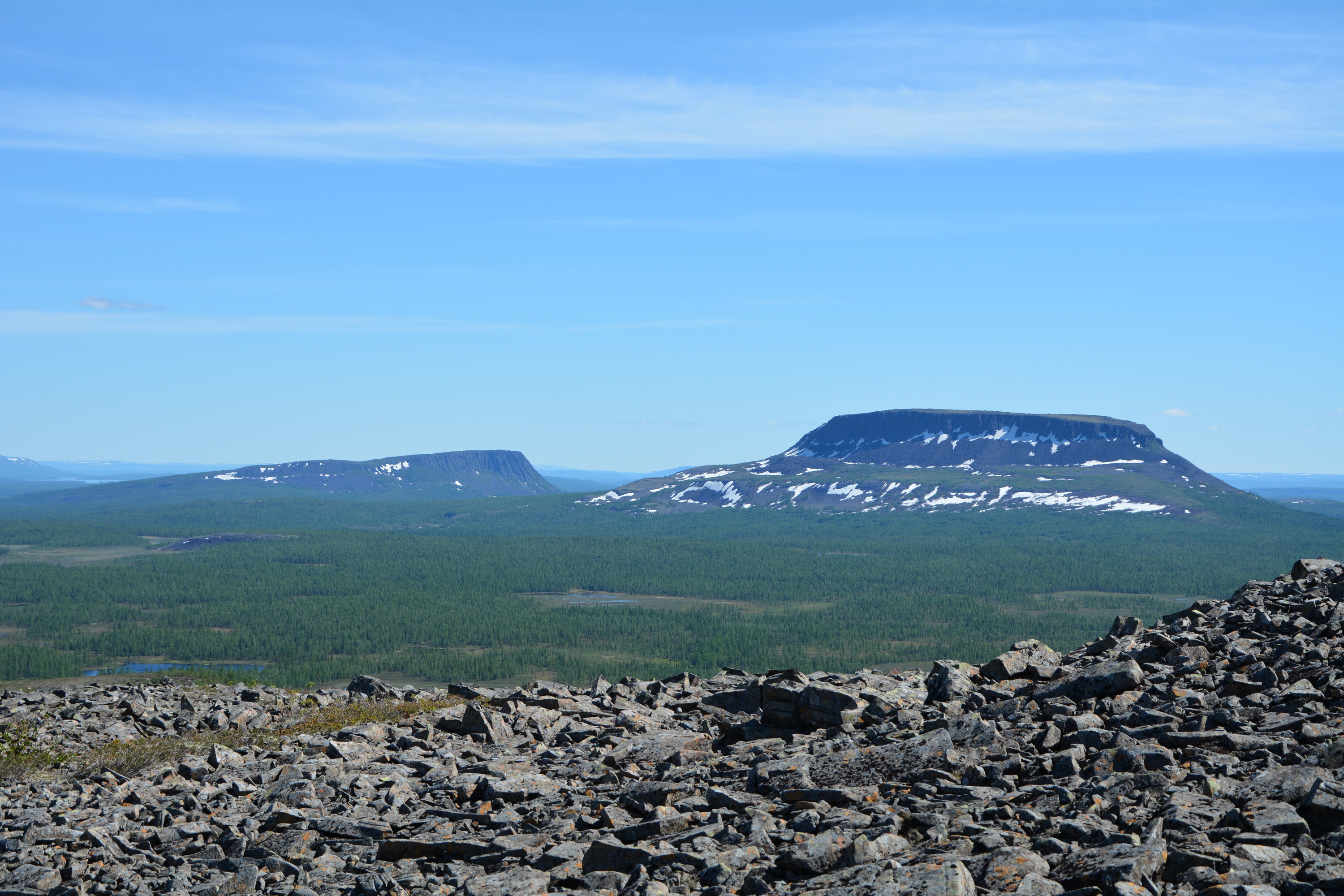 Между Нындэкой и Гнутихой, Turukhansky District, Krasnoyarsk Krai, Russia